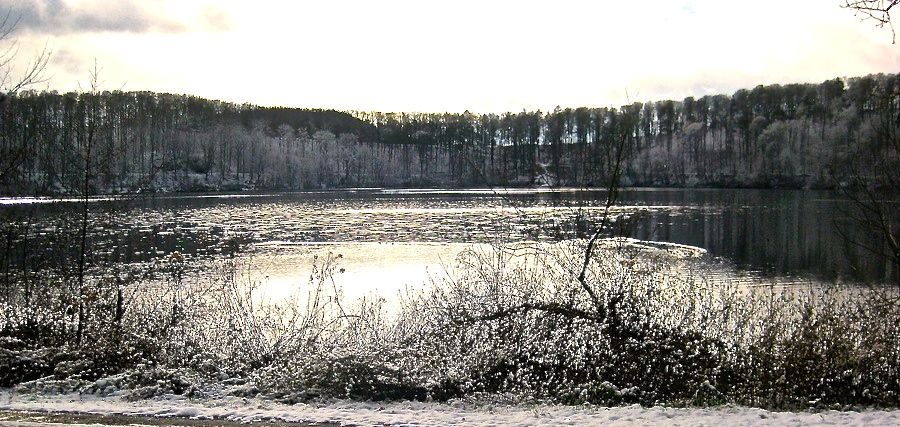 Das Pulvermaar in winterlicher Stille